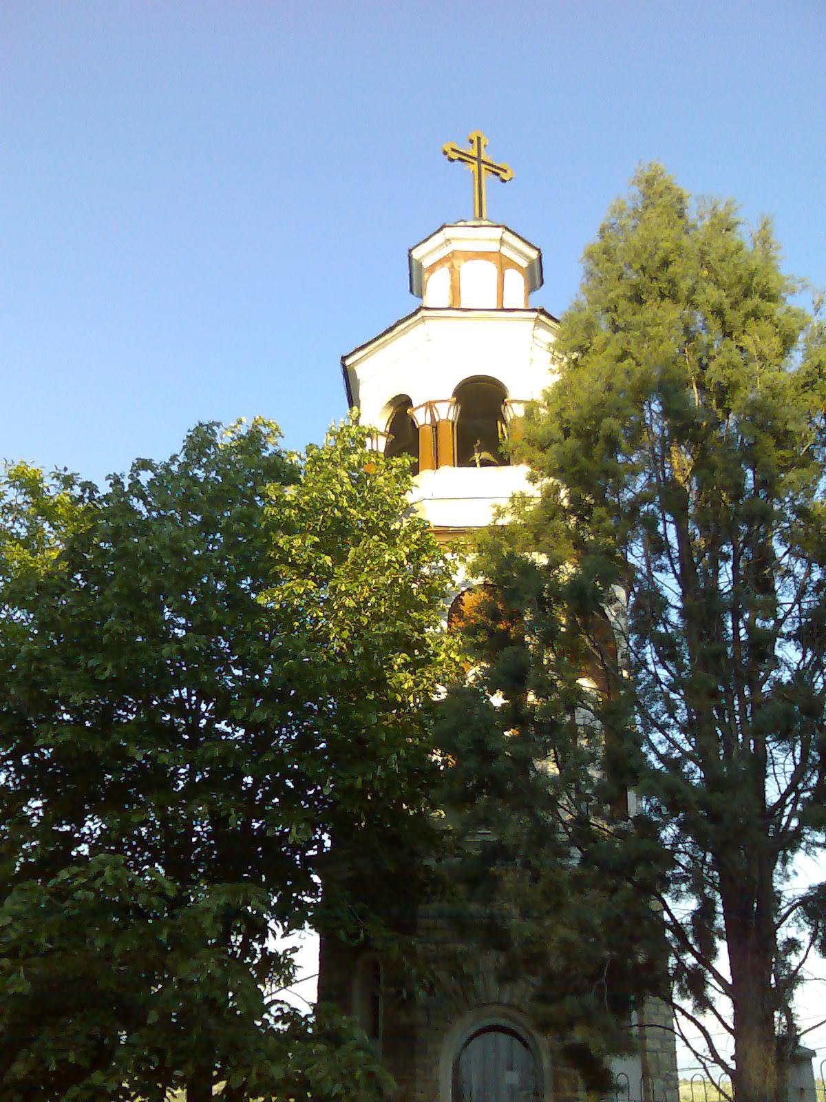 Камбанарията на църквата в Свети Никола, Република Македония